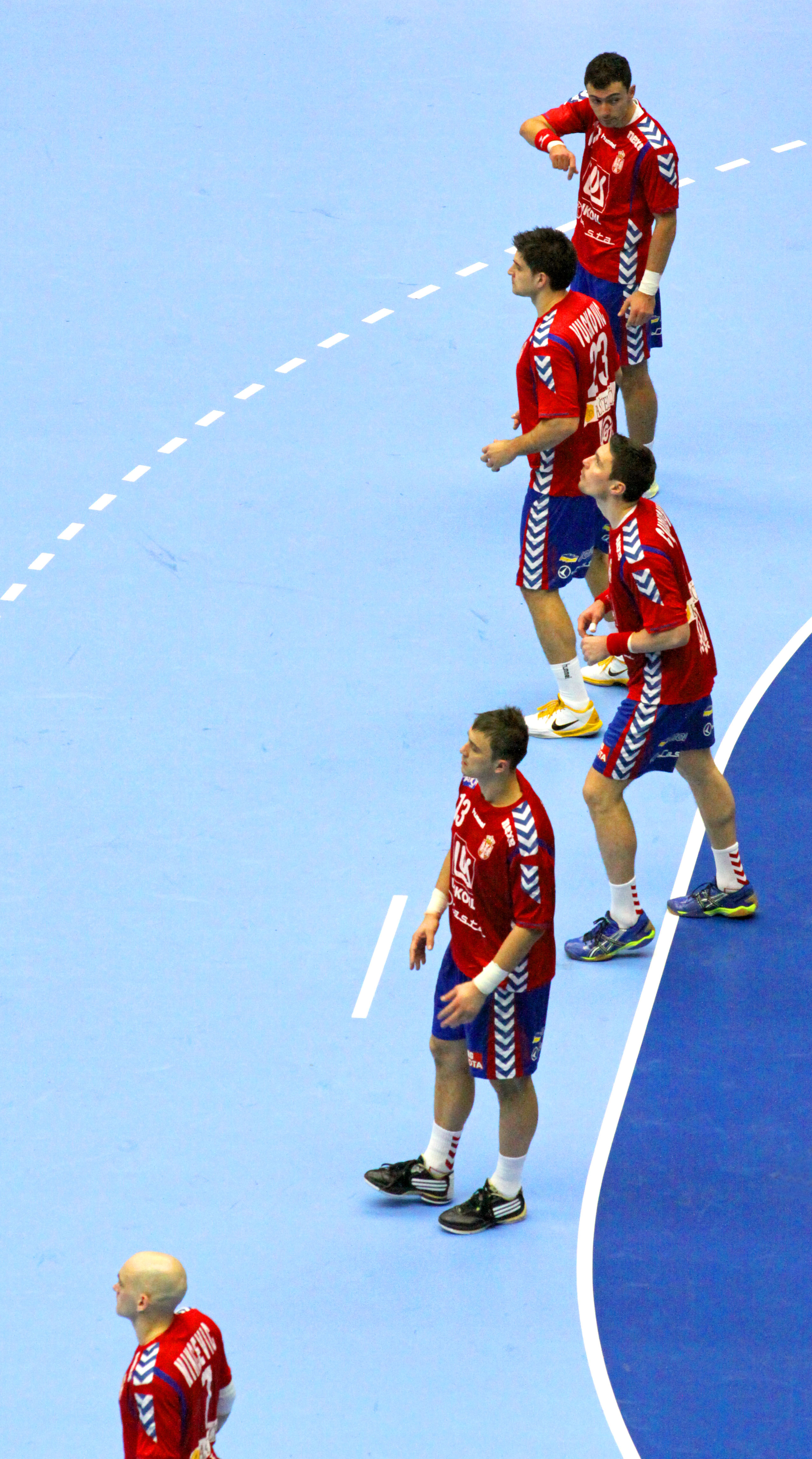 Malmö. Sverige-Serbien på Handbolls VM.